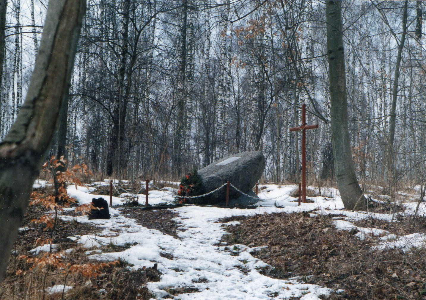 Pomnik ofiar mordów hitlerowskich w lesie pod Łobżenicą. Zdjęcie z 1996r.